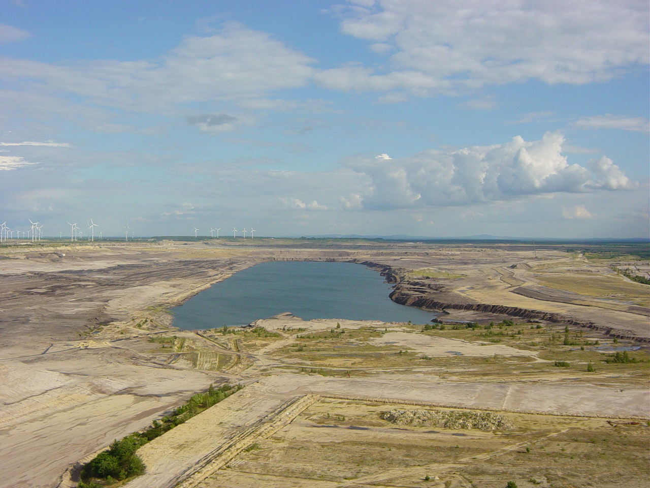 Der Bergheider See im Jahr 2004. Aufgenommen auf dem Besucherbergwerk F60 in Lichterfeld. Die Begrünung im vorderen Bildteil wird eine Insel sein. Daneben ist eine angelegte Bucht, der spätere Hafen erkennbar.